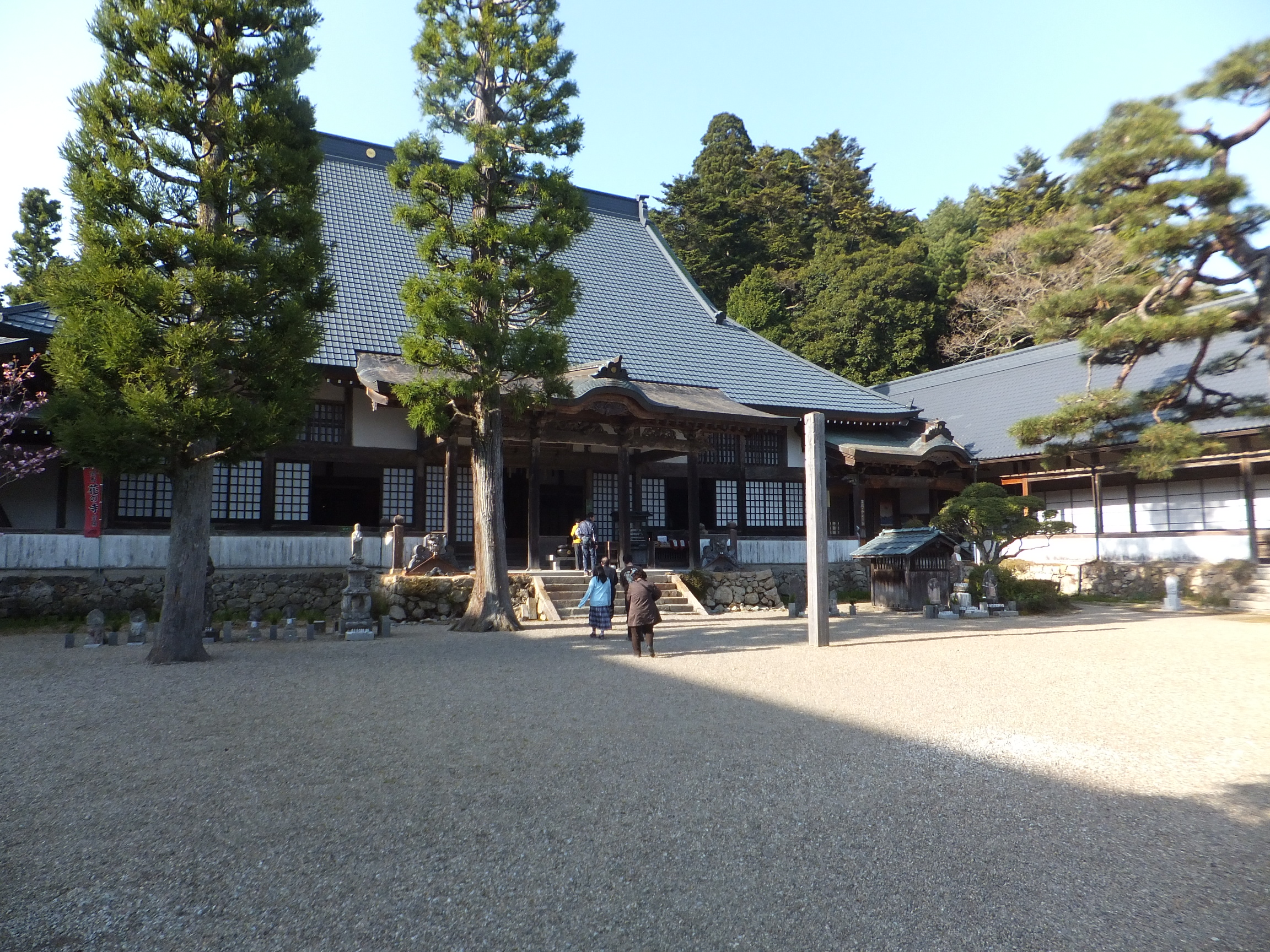 永沢寺 （2013年4月28日）